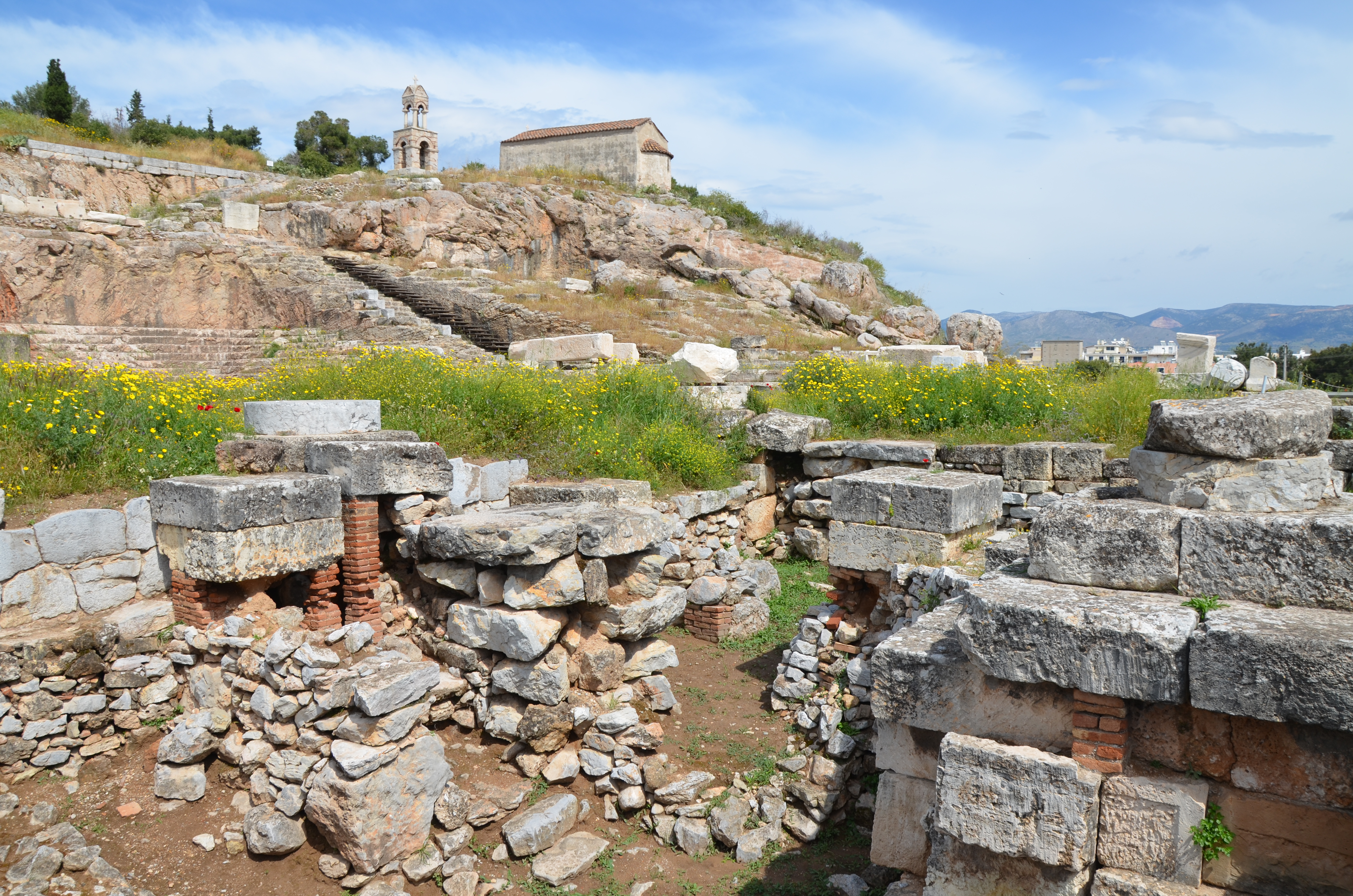 Eleusis